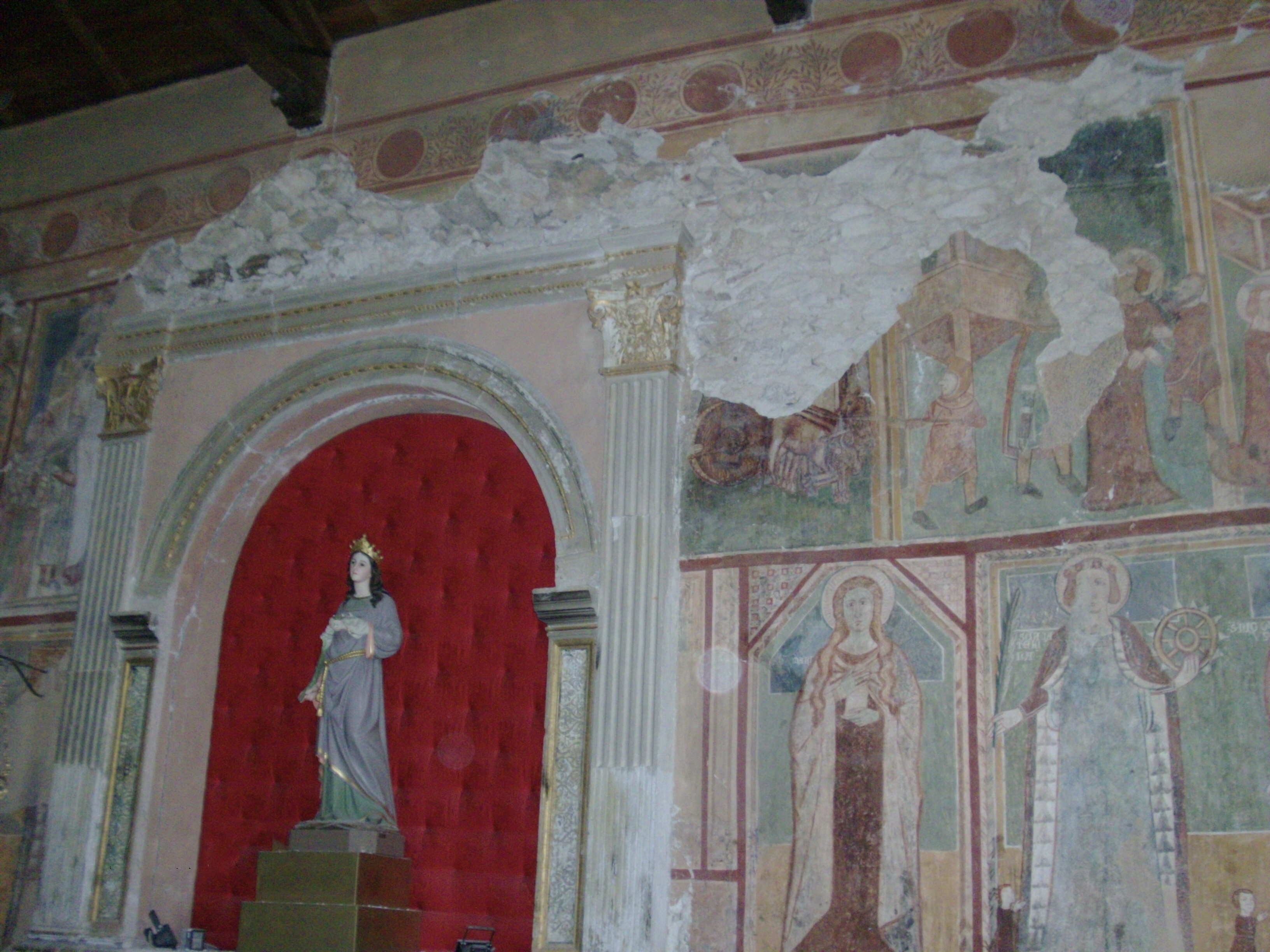 Interno dell'abbazia post-sisma